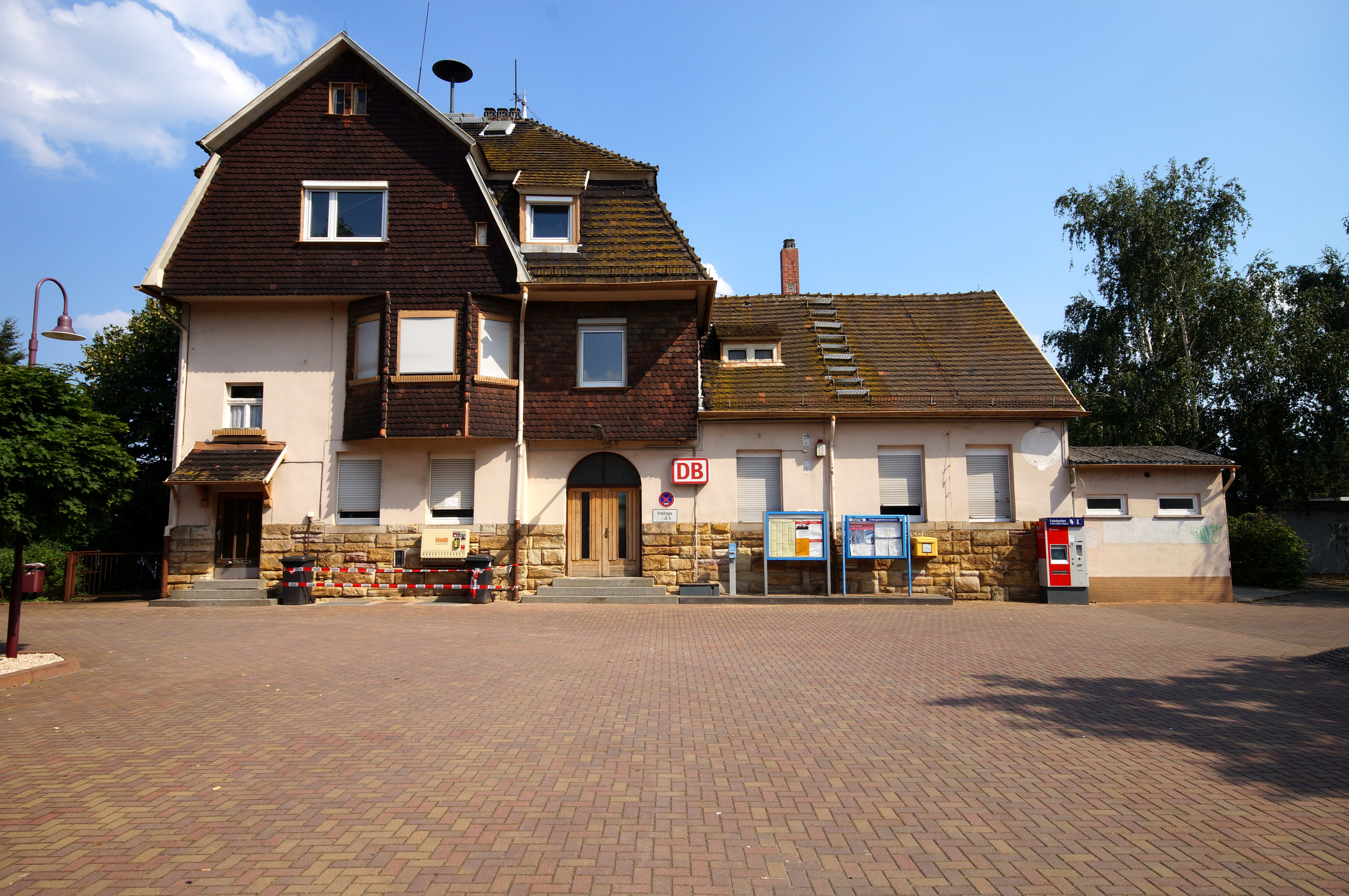 Das Bahnhofsgebäude des Groß-Rohrheimer Bahnhofs